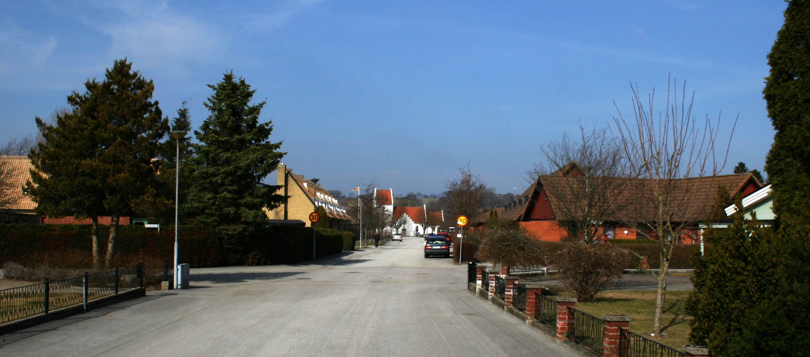 Gata i Revingeby med kyrkan i bakgrunden